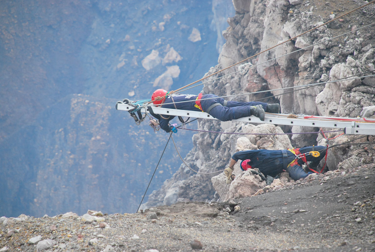 Foto de portada de Diarios, Rescate Cráter Santiago